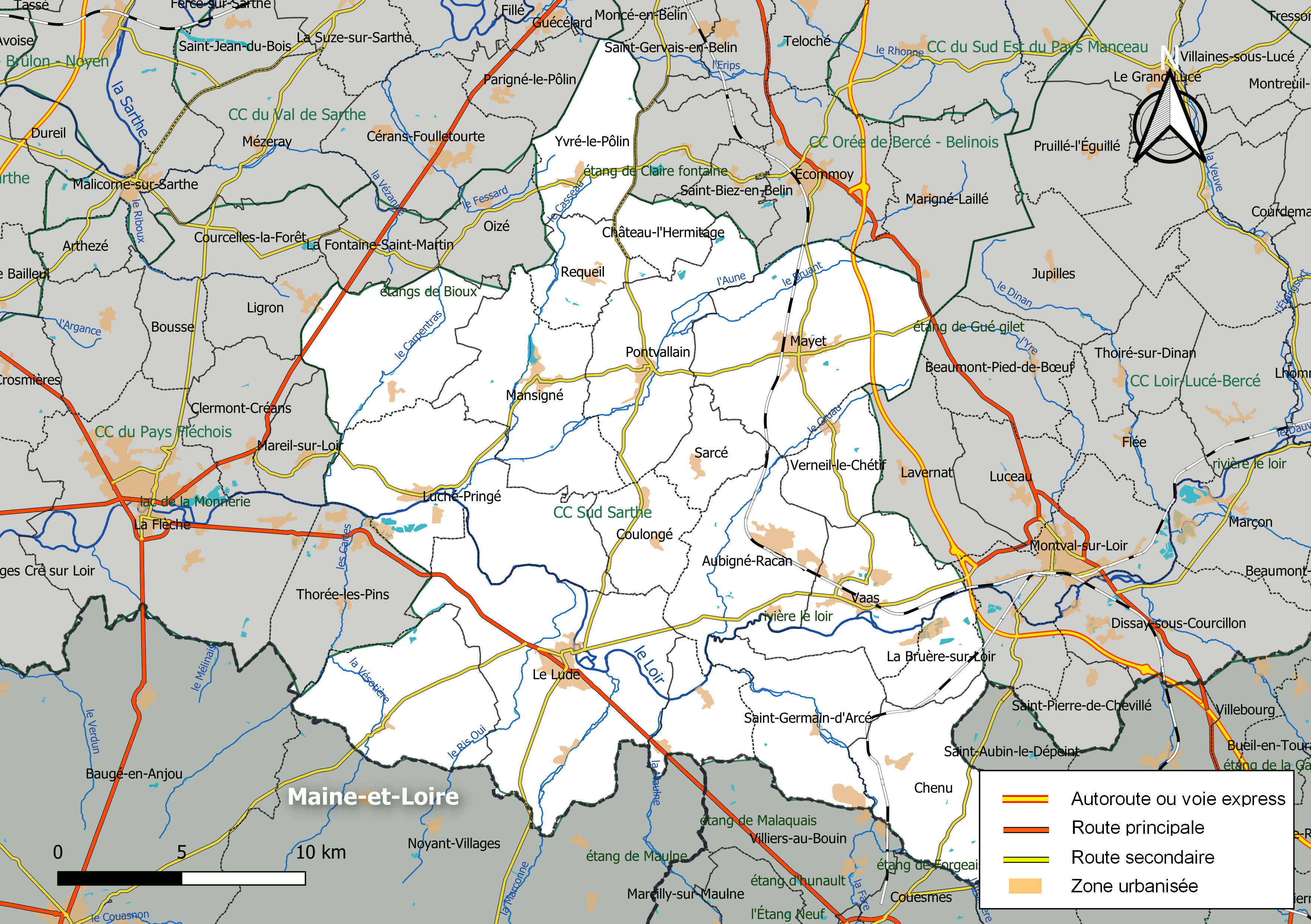 Carte géographique de la Communauté de communes Sud Sarthe, département de la Sarthe, France. Composition au 1er janvier 2019.